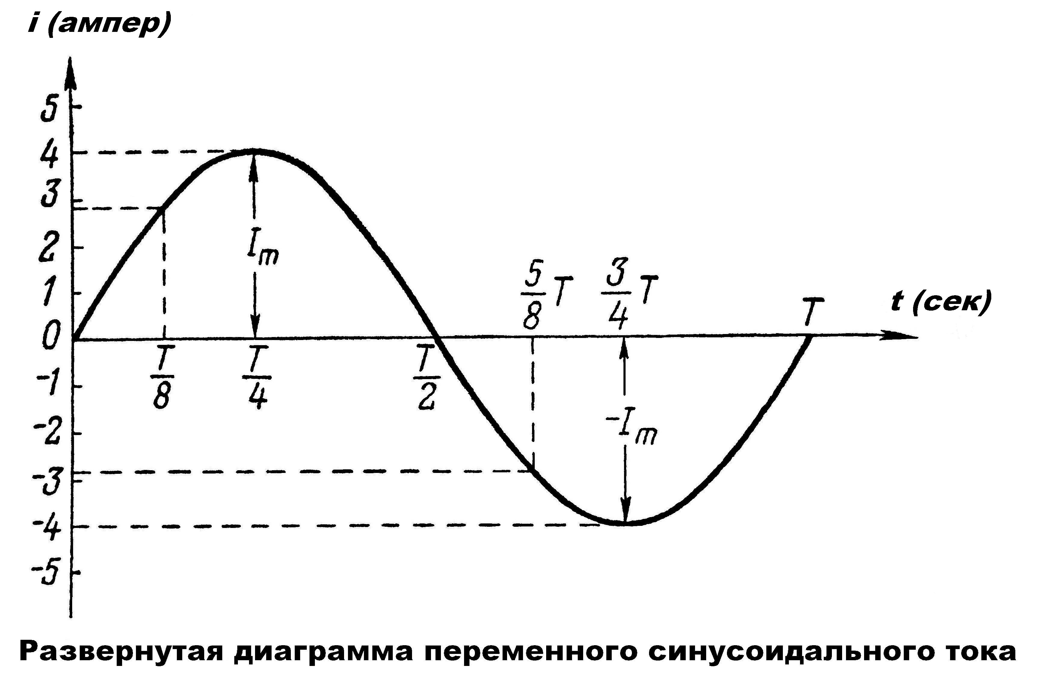 Развернутая диаграмма переменного синусоидального тока